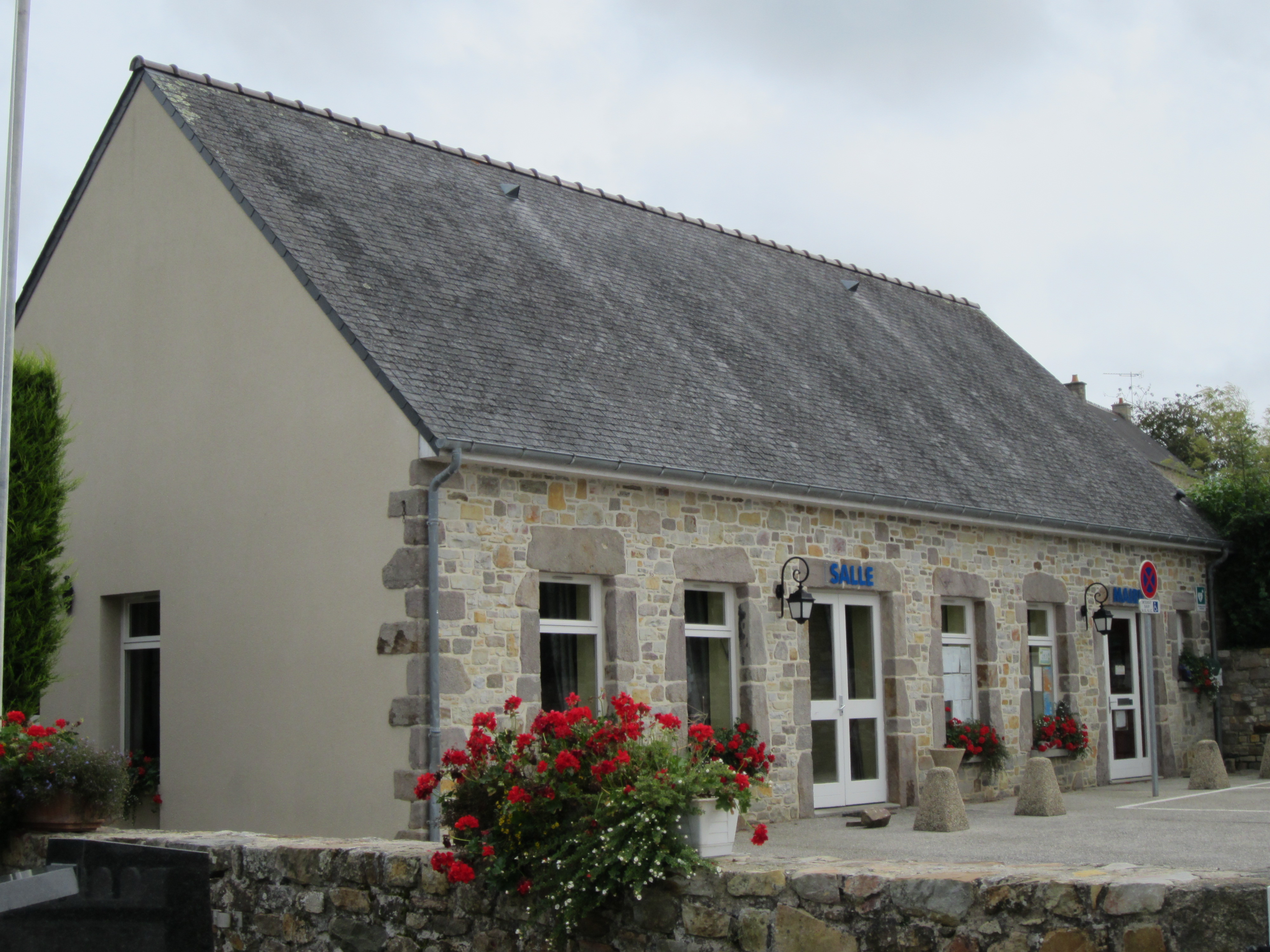 mairie de Saint-Christophe-du-Foc